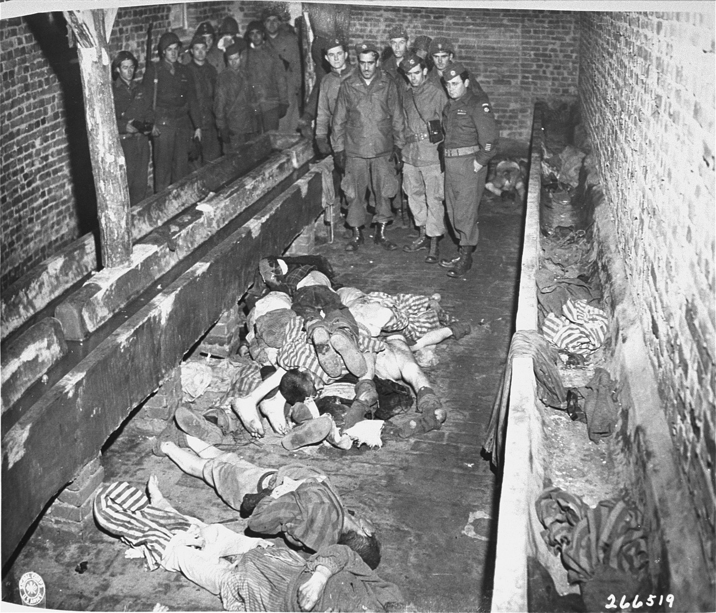 Verstorbene Häftlinge des KZ Wöbbelin